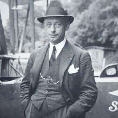 Emile Taddéoli in 1920